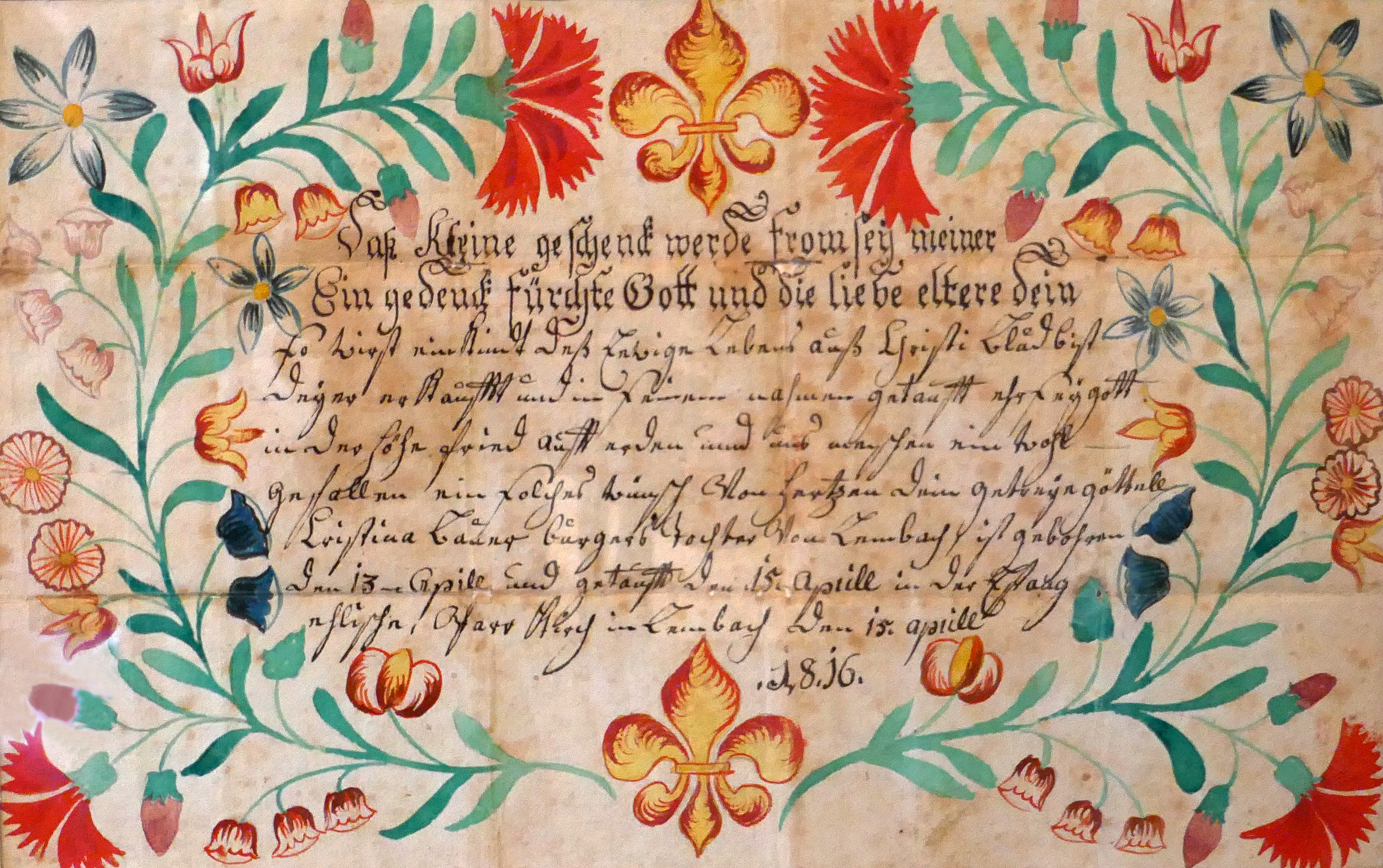 Les Alsaciens émigrés aux Etats-Unis ont parfois emporté avec eux leur lettre de baptême. Celle d'un enfant de Lembach, né en 1816, a été acquise aux Etats-Unis. Exposition Vies protestantes : le mot et l'image au Musée alsacien de Strasbourg (2017).